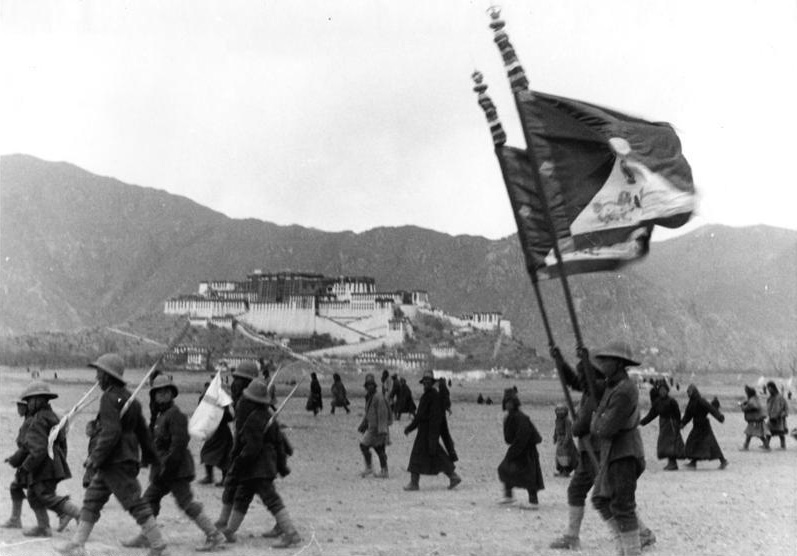 Lhasa, die Neujahrsparade des modernen Militärs vor dem Potala